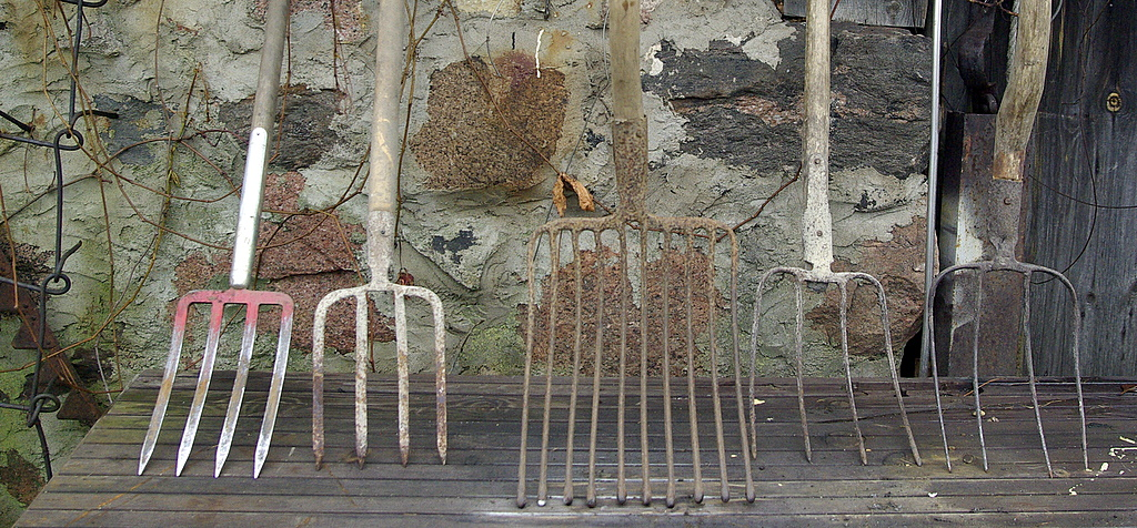 Erinevad hargid